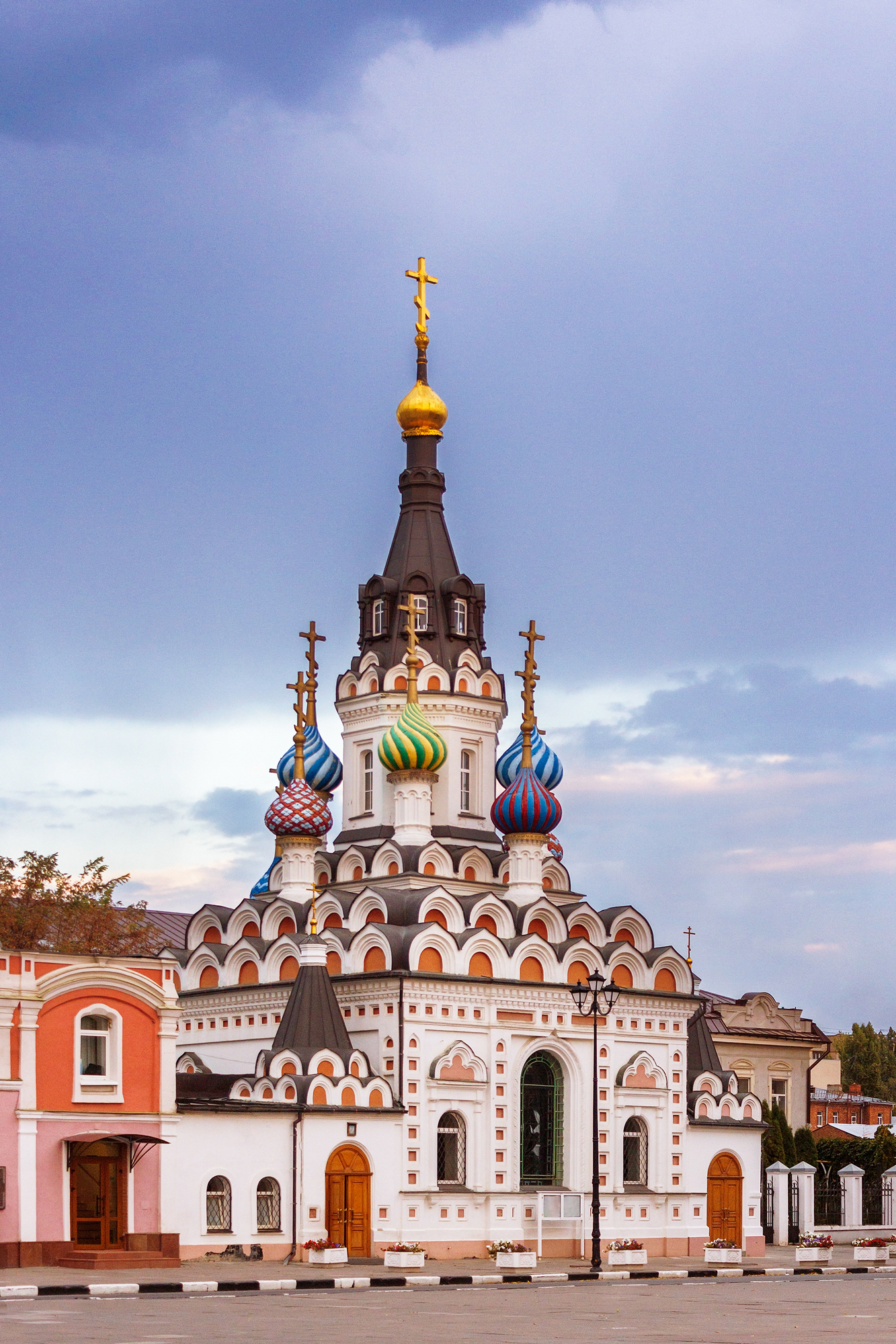 Церковь-часовня «Утоли моя печали»: улица Волжская, 36, Саратов, Саратовская область